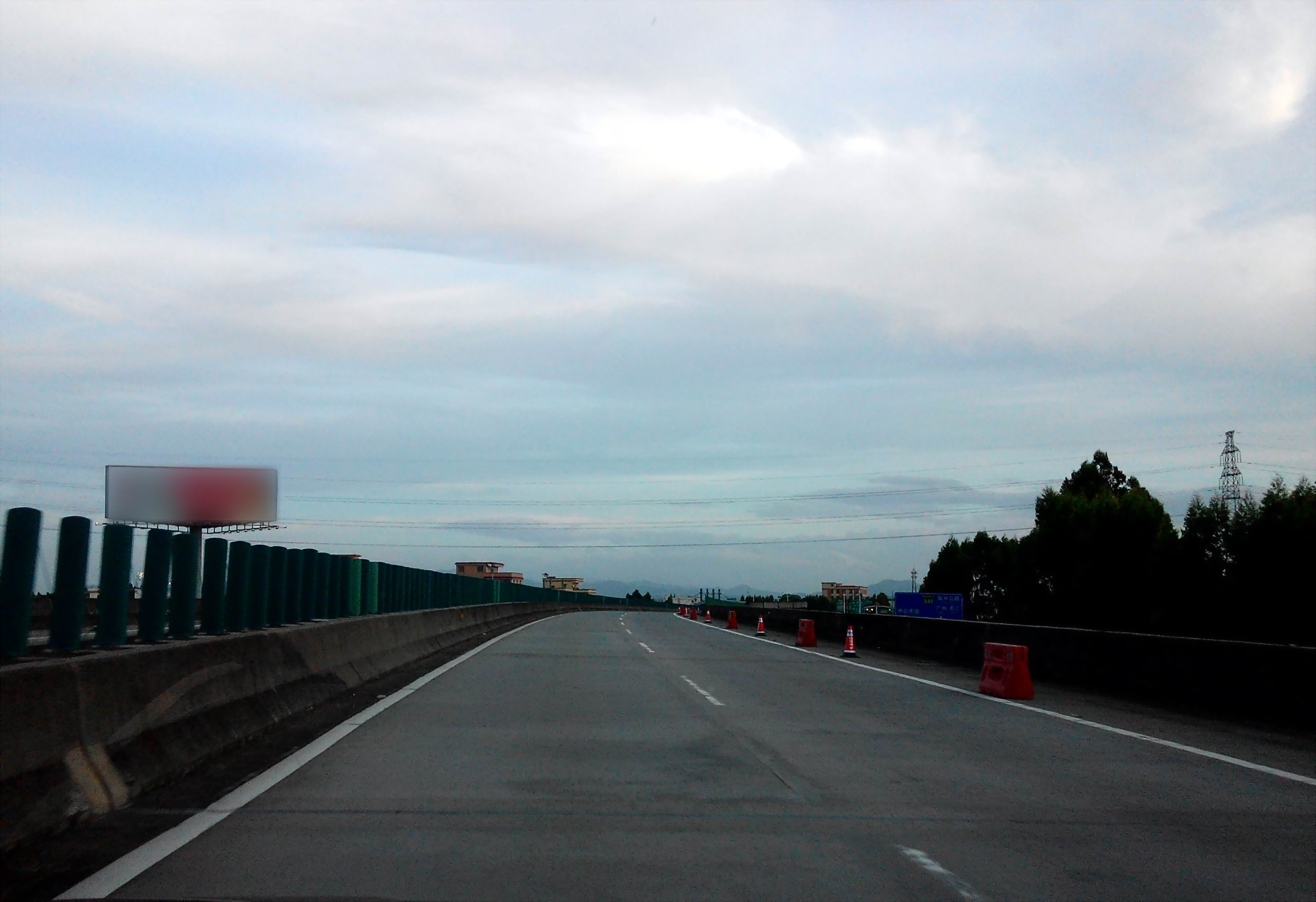 粤高速S49 近新会司前 台山方向